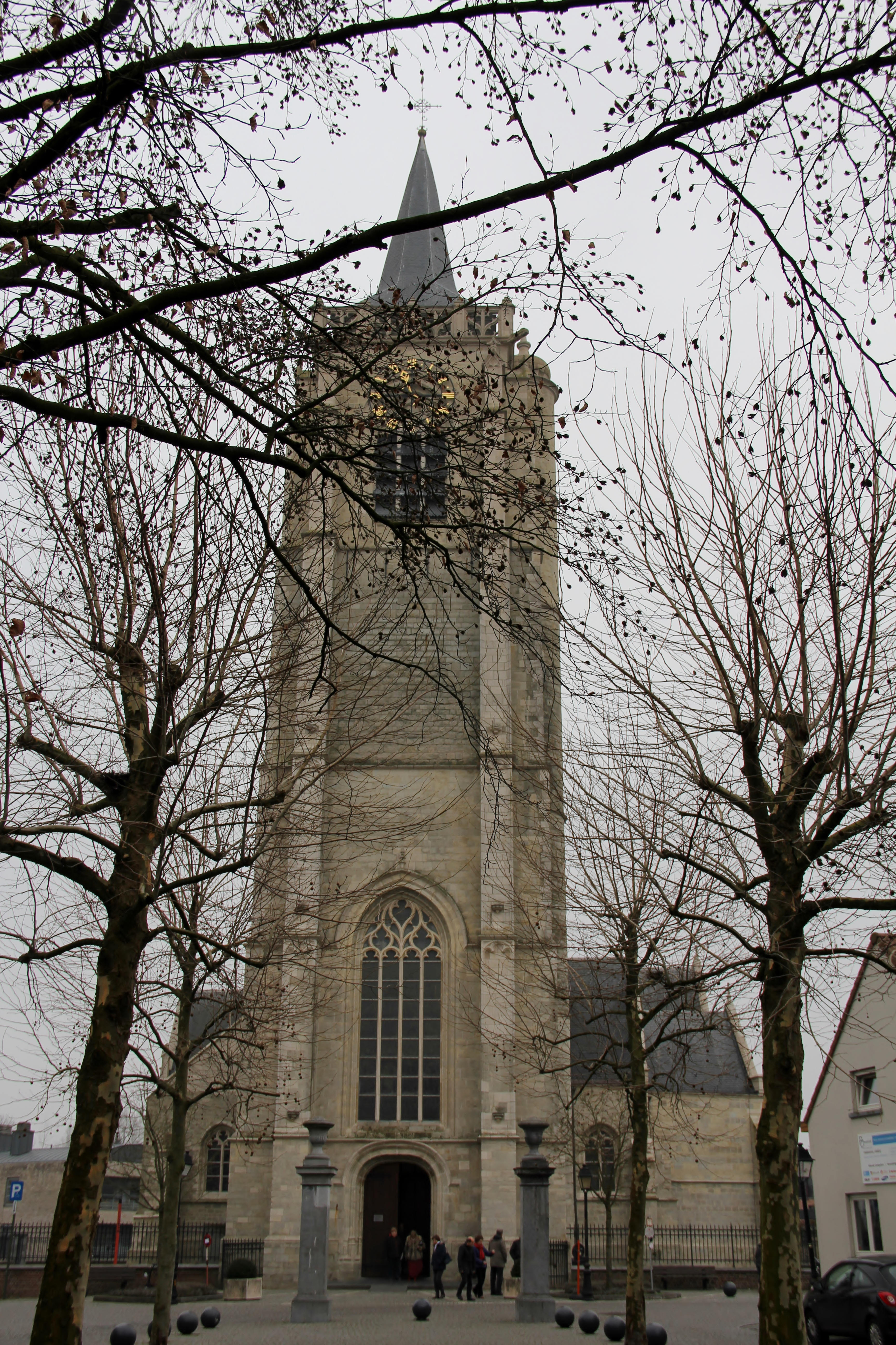 Parochiekerk Sint-Gertrudis Ternat, Kerkplein